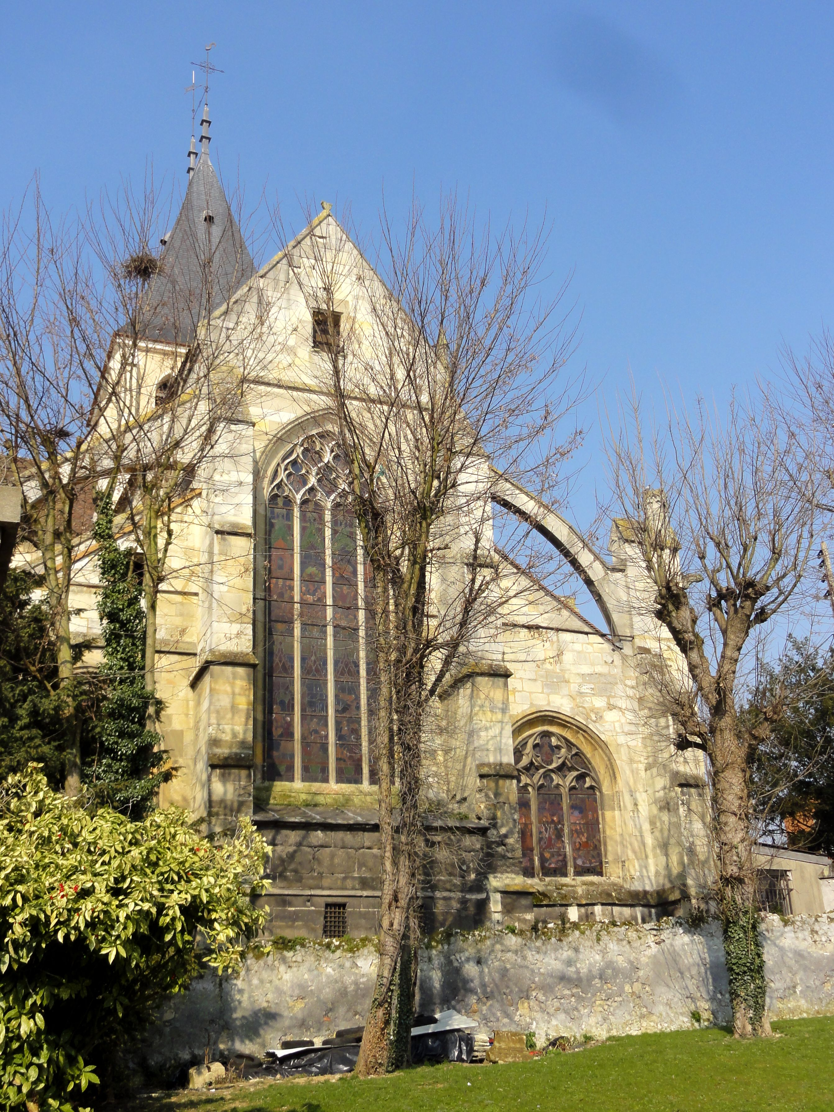 Vue sur le chevet.